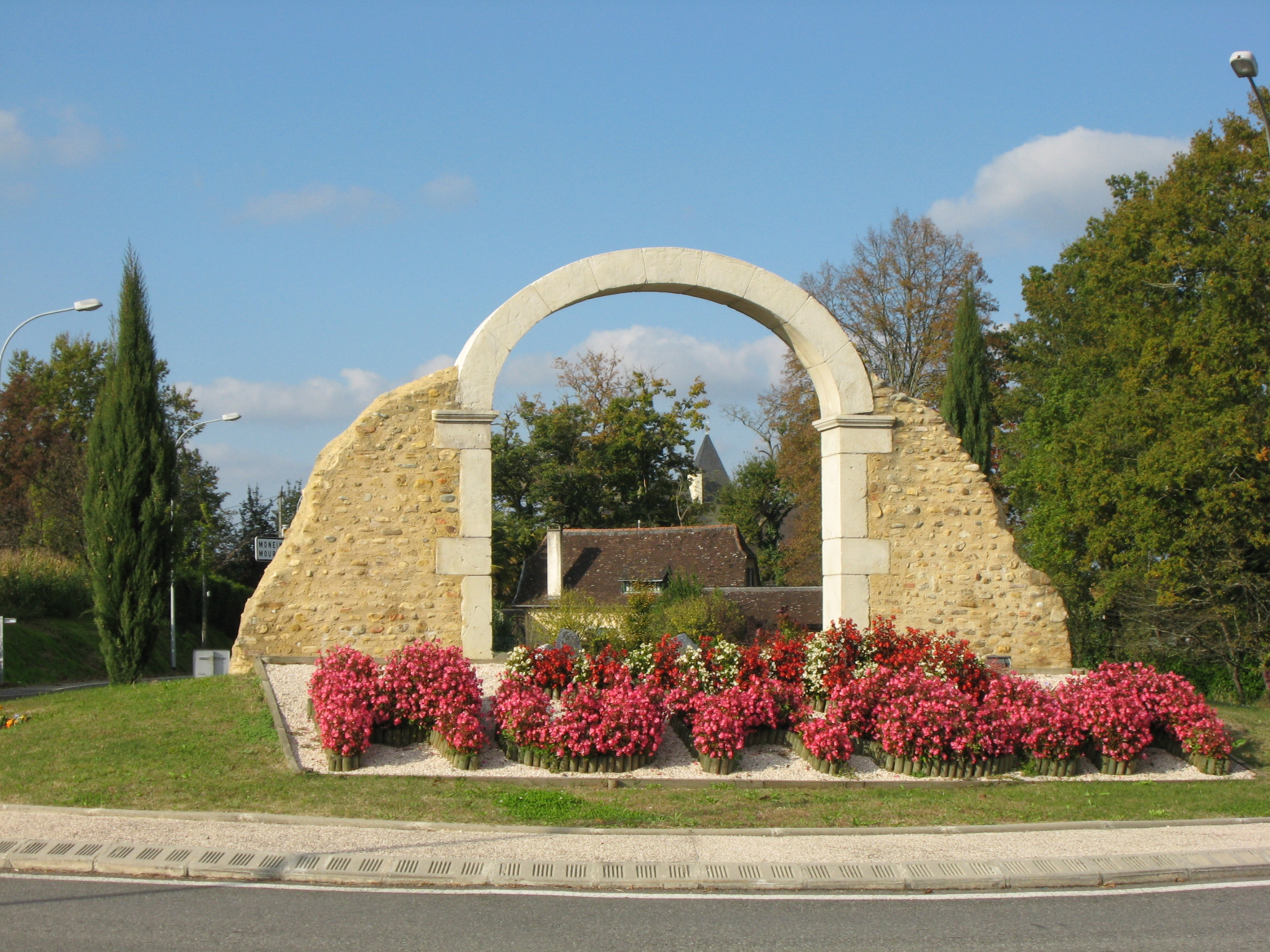 Entrée de Monein depuis Oloron (Pyrénées Atlantiques) Pyrénées).